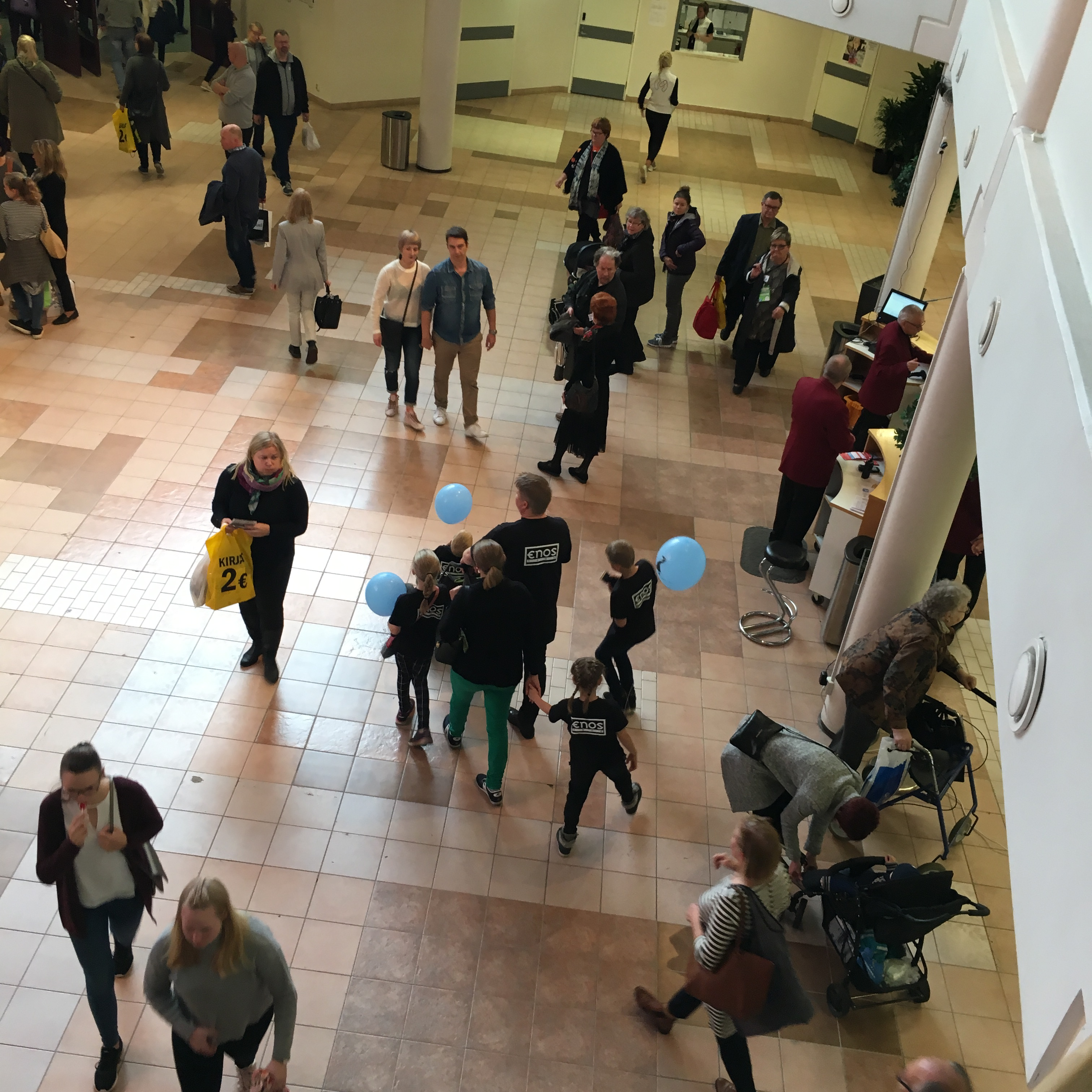 Enostone Kustannuksen väki Turun kirjamessuilla lokakuussa 2017